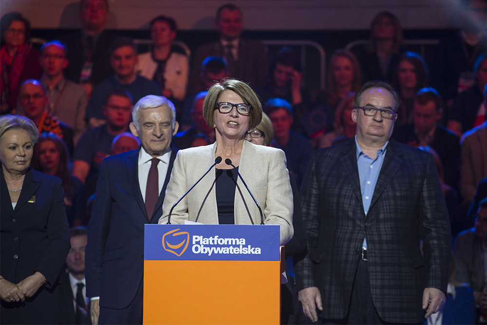 Julia Pitera, konwencja wyborcza, Sopot 12.04.2014.